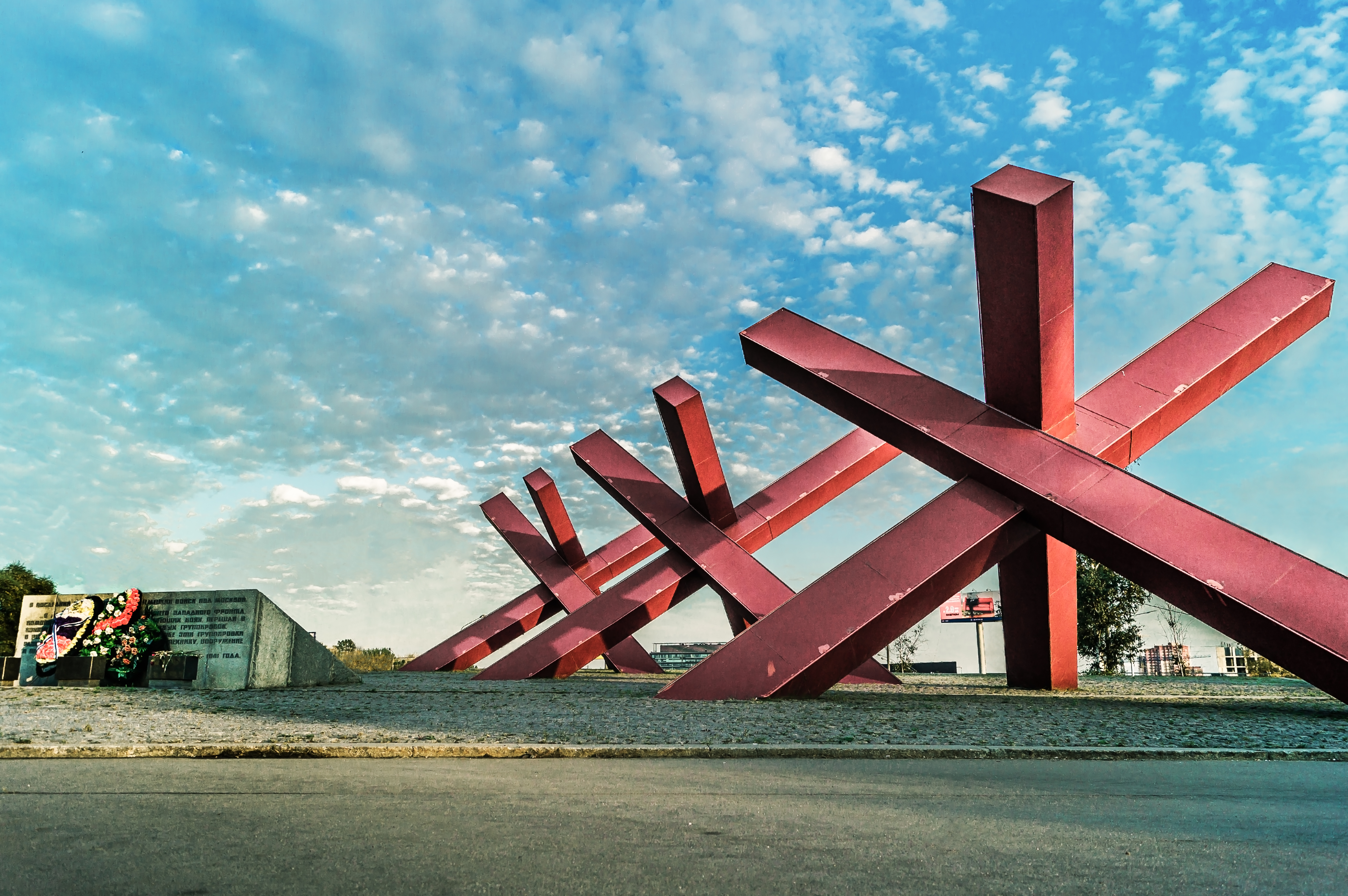 Памятник защитникам Москвы «Ежи»: шоссе Ленинградское, 23-й км, Химки, Московская область